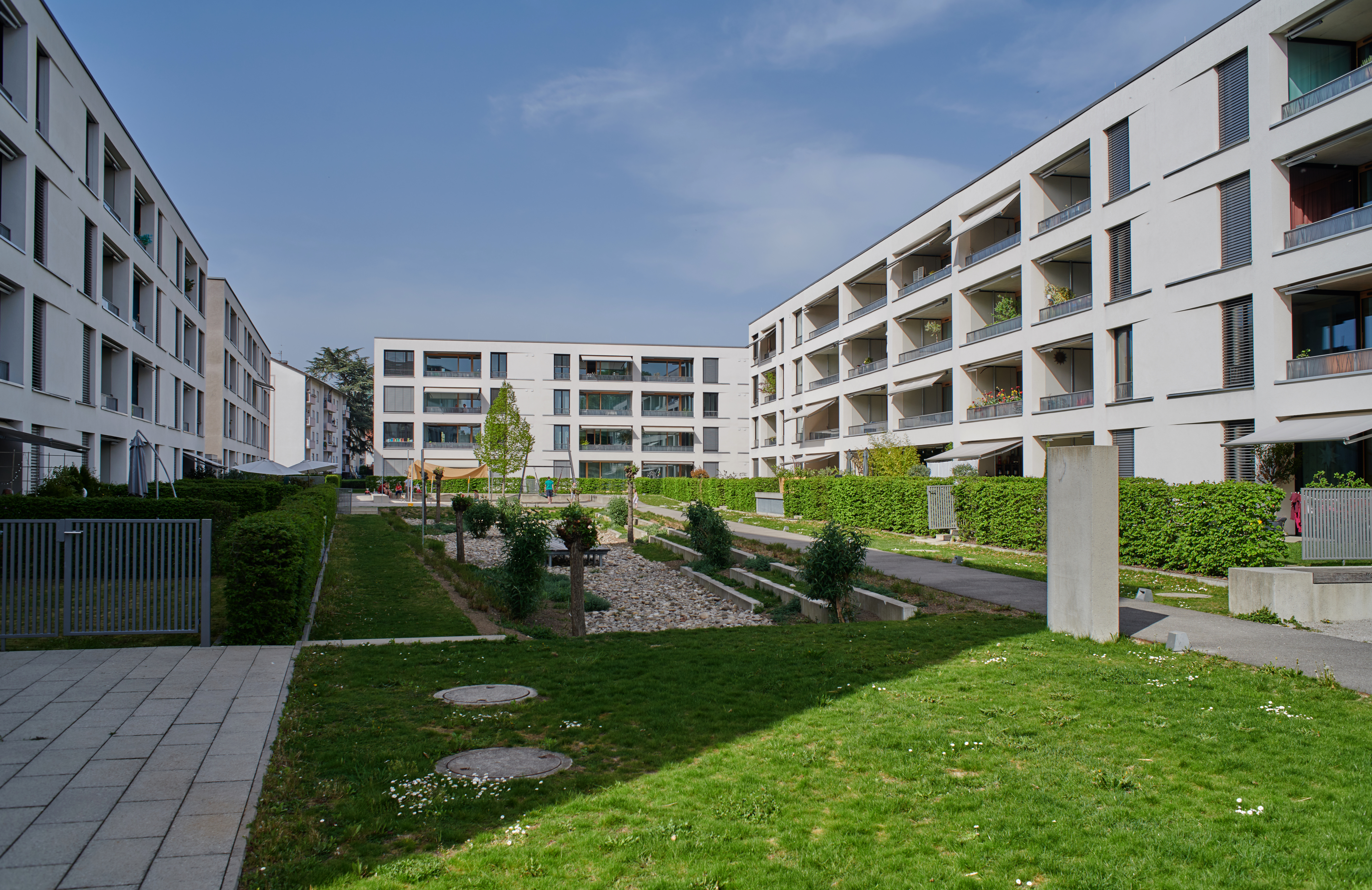 Lörrach: Wohnquartier Niederfeldplatz